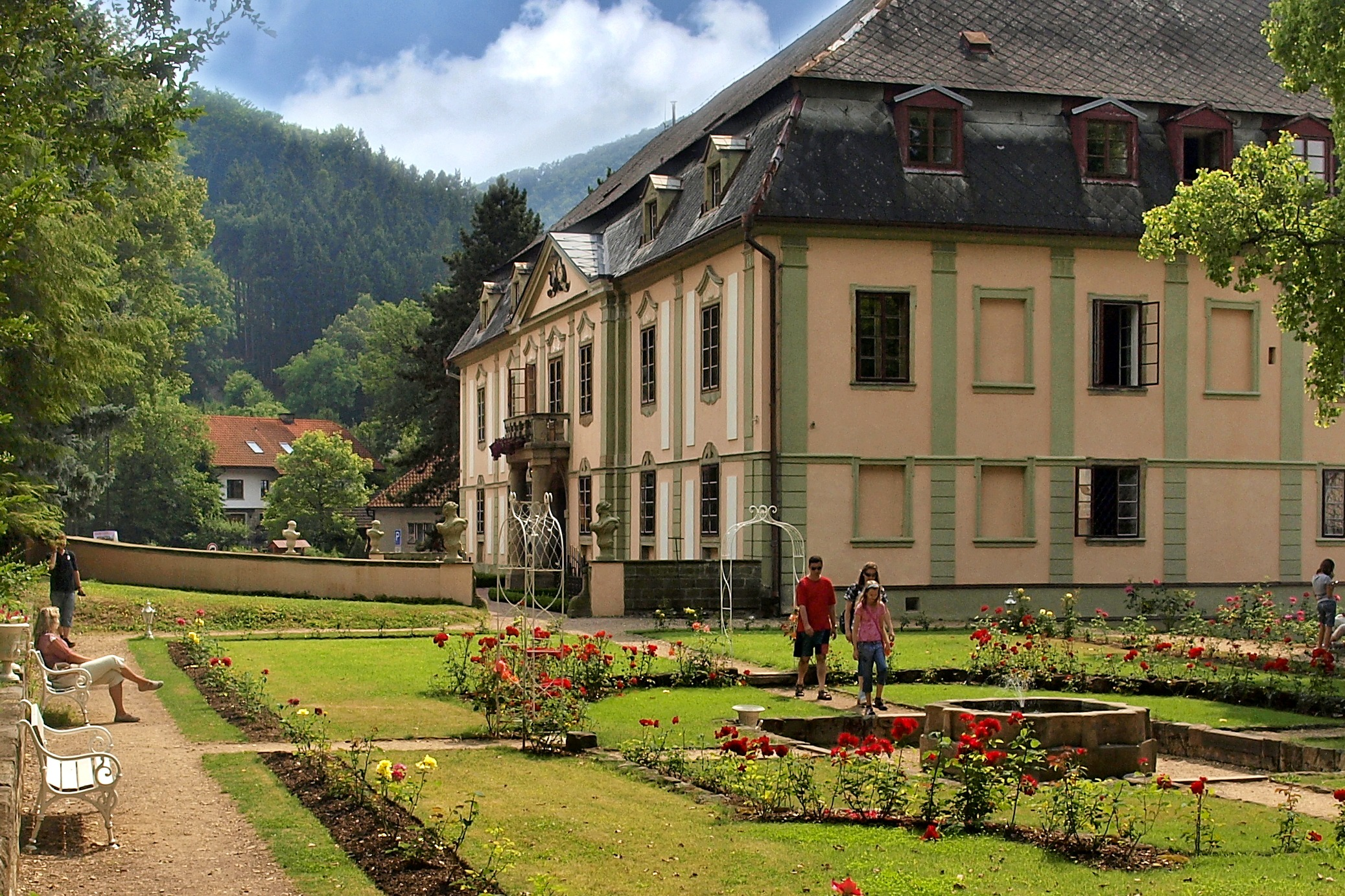 Potštejn růžový sad